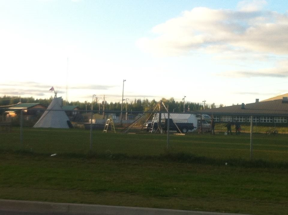 préparation du Pow-wow